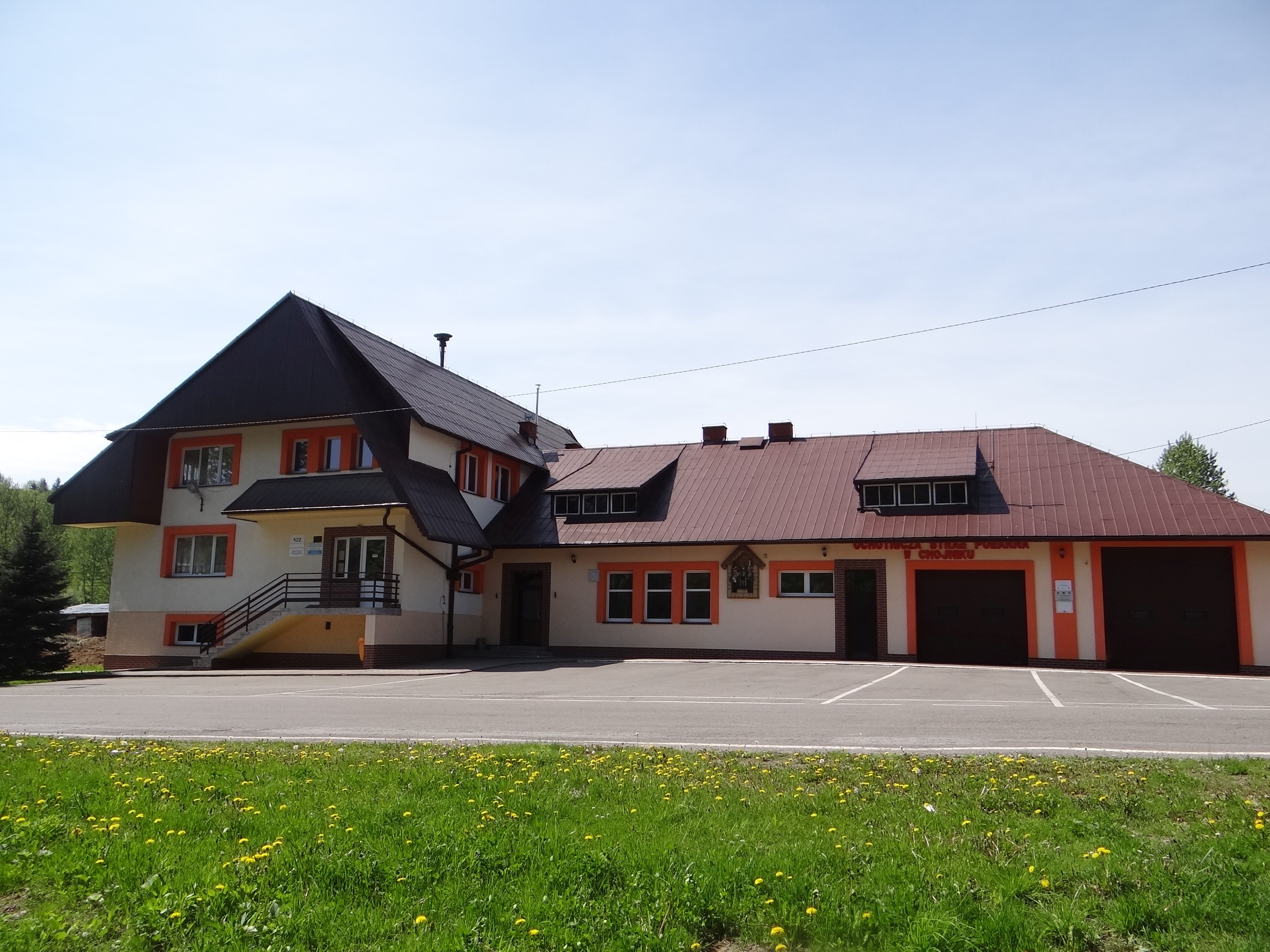 Remiza OSP i ośrodek zdrowia w Chojniku